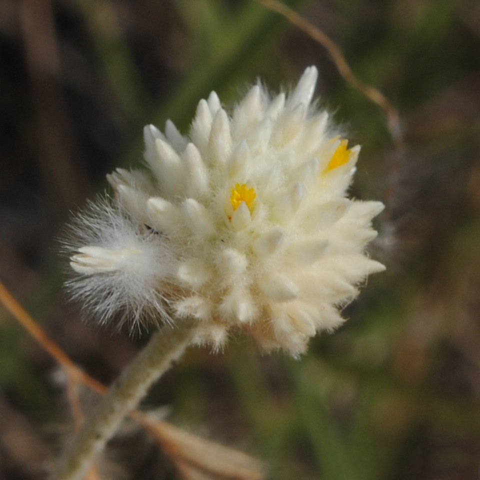 Pfaffia gnaphalioides. Amaranthaceae. Fotos tomadas al margen de la Ruta 55 y al margen del lago entre rocas en Palmar, departamento de Soriano, Uruguay.